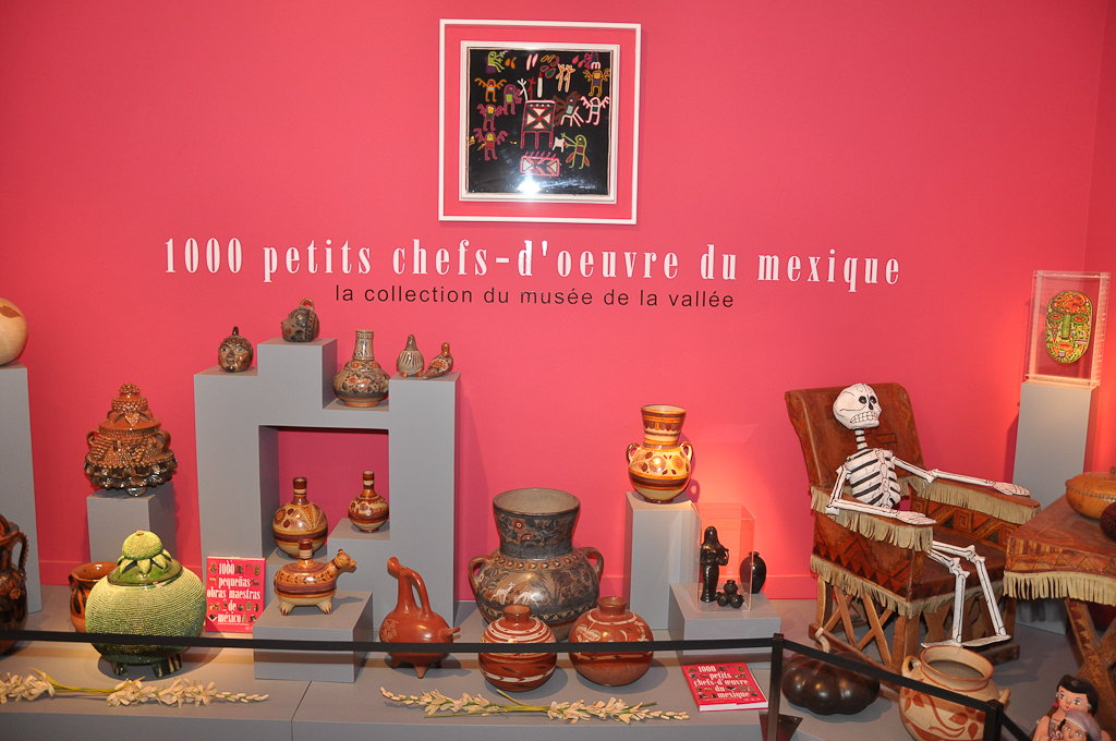 Musée de la vallée de Barcelonnette